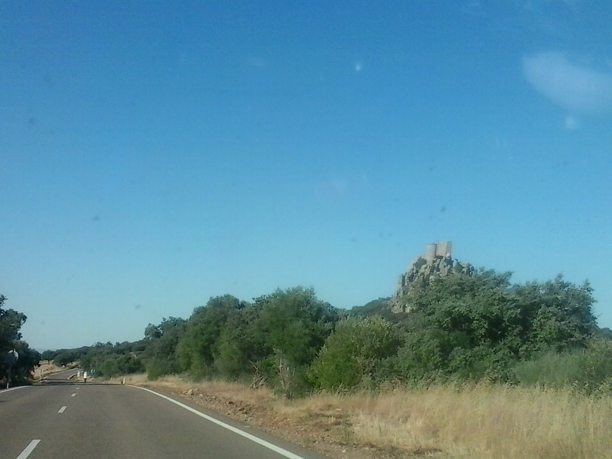 Castillo de Almorchón. Agosto de 2013